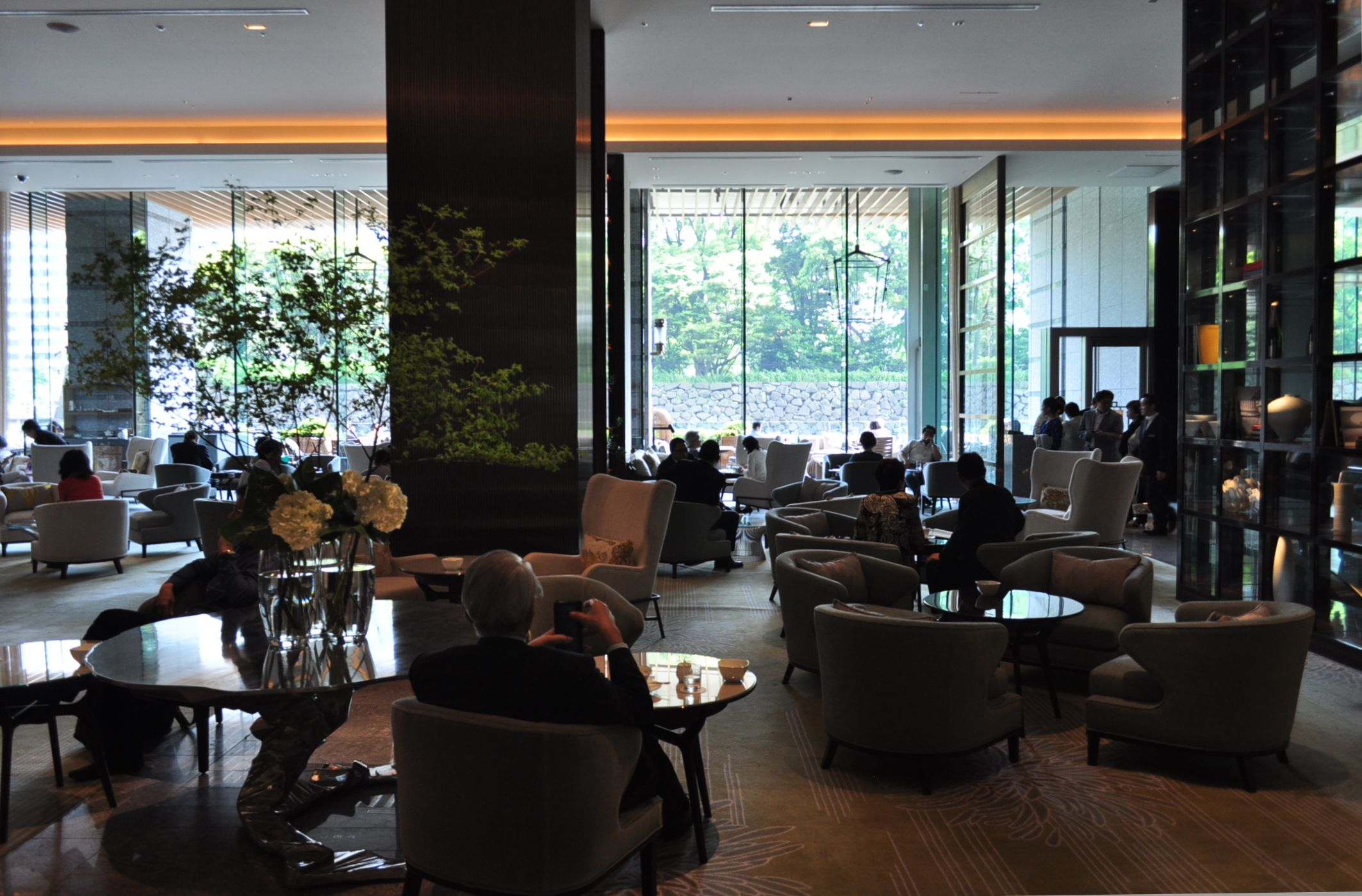 パレスホテル東京